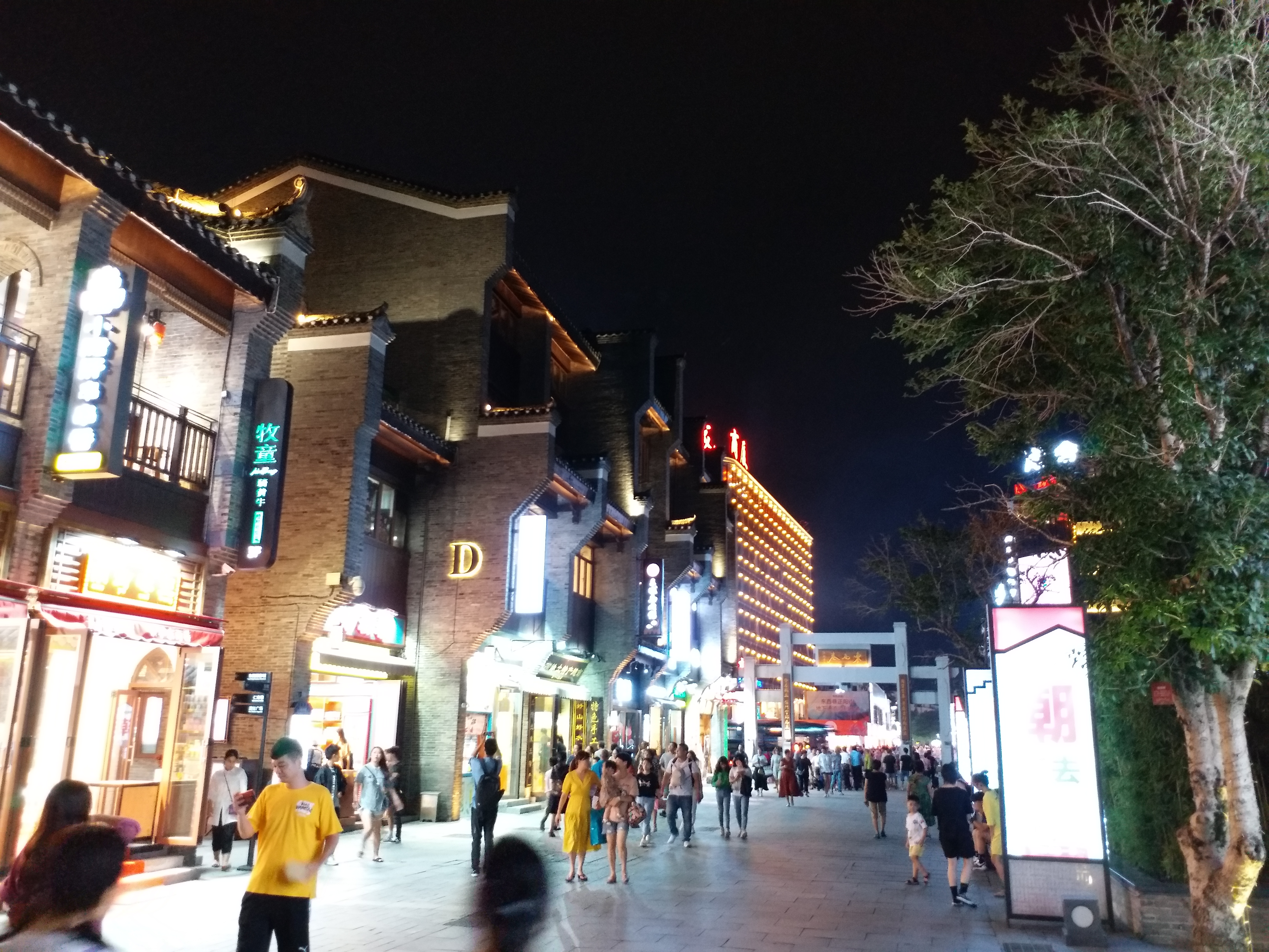 桂林东西巷